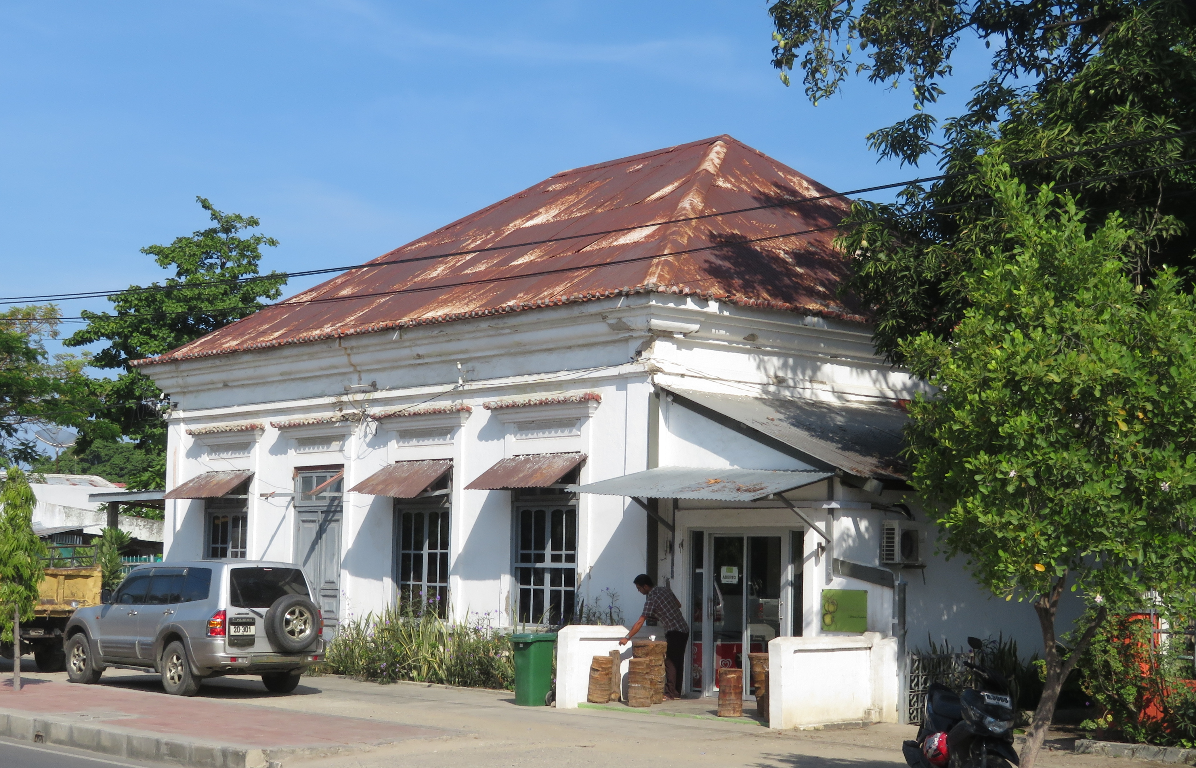 Antiga residência do gerente do Banco Nacional Ultramarino, Dili, Timor Leste